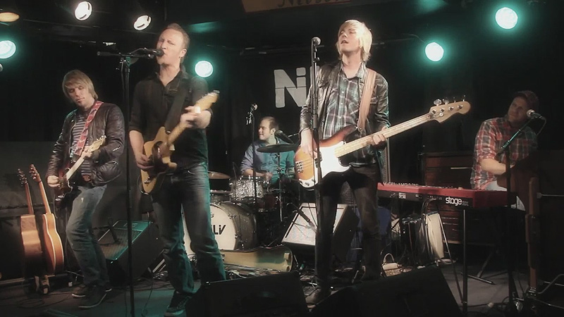 Ni Liv spiller på Herr Nilsen i Oslo, 11. oktober 2011